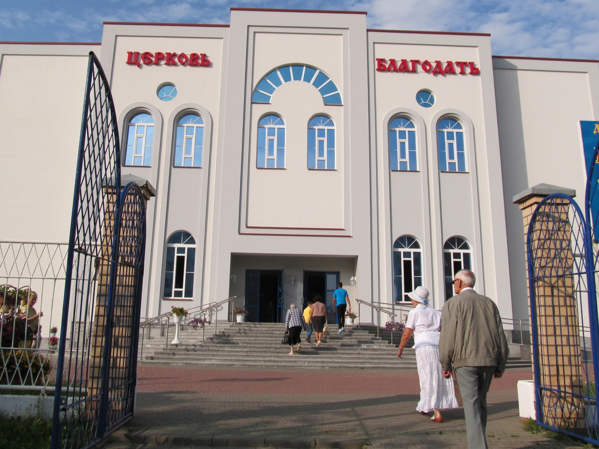 Церковь Благодать, Минск